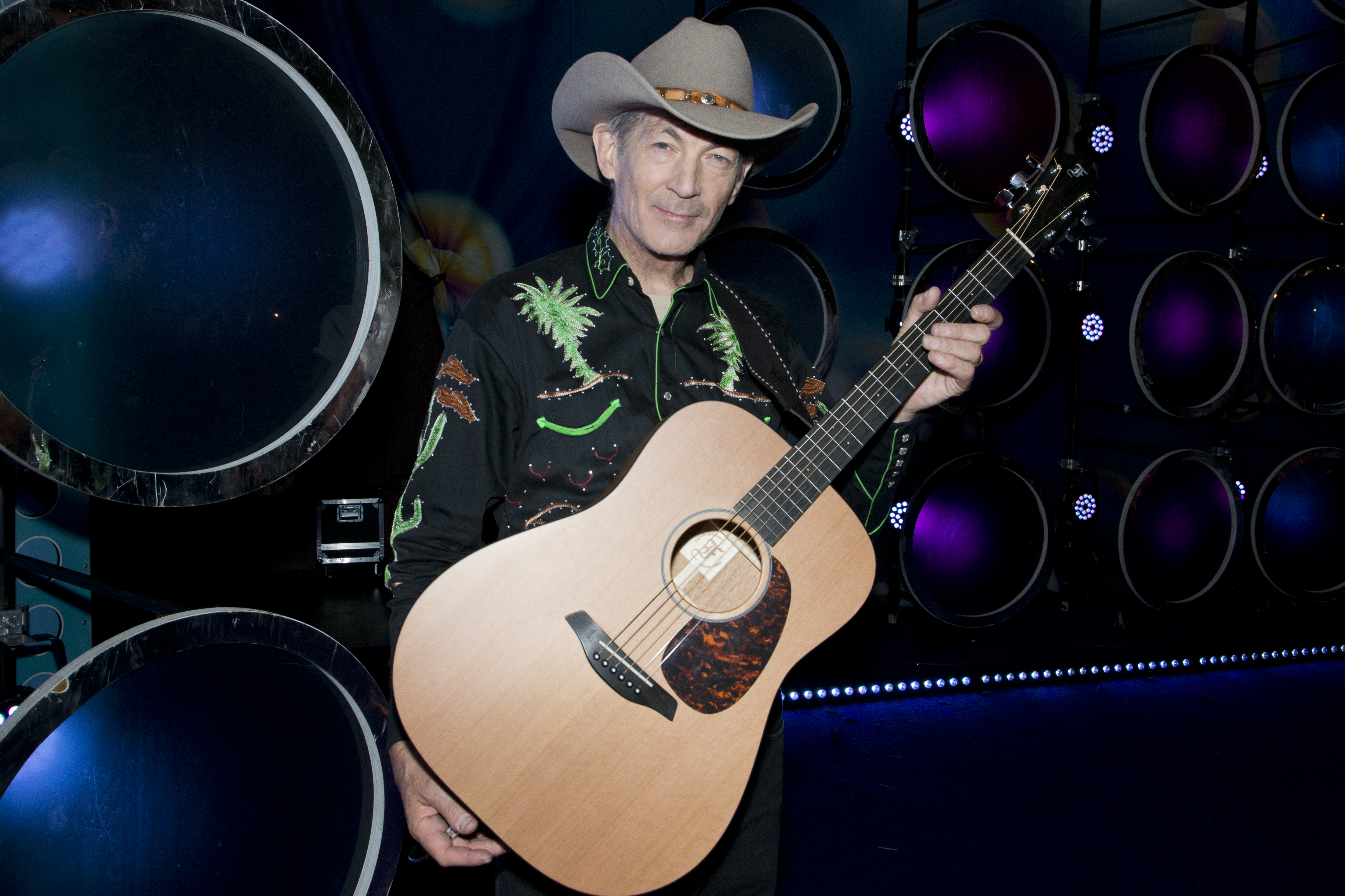 Doug Seegers besöker Sommarkrysset